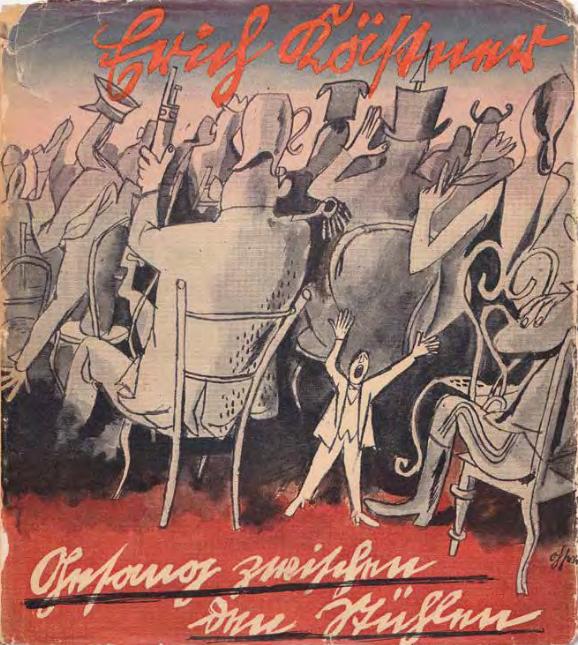 Erich Ohser - Schutzumschlag für Erich Kästners Gedichtband Gesang zwischen den Stühlen, Stuttgart/Berlin, Deutsche Verlags-Anstalt, 1932